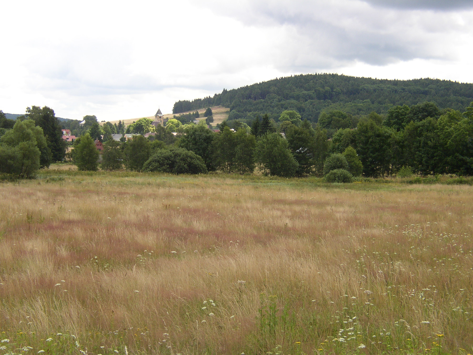 Rybniště, celkový pohled